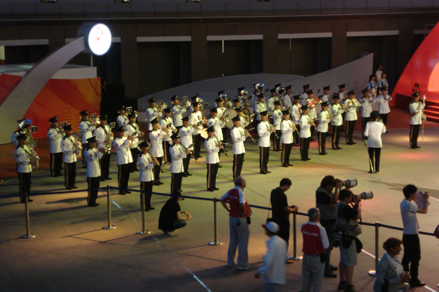 Hong Kong Police Band